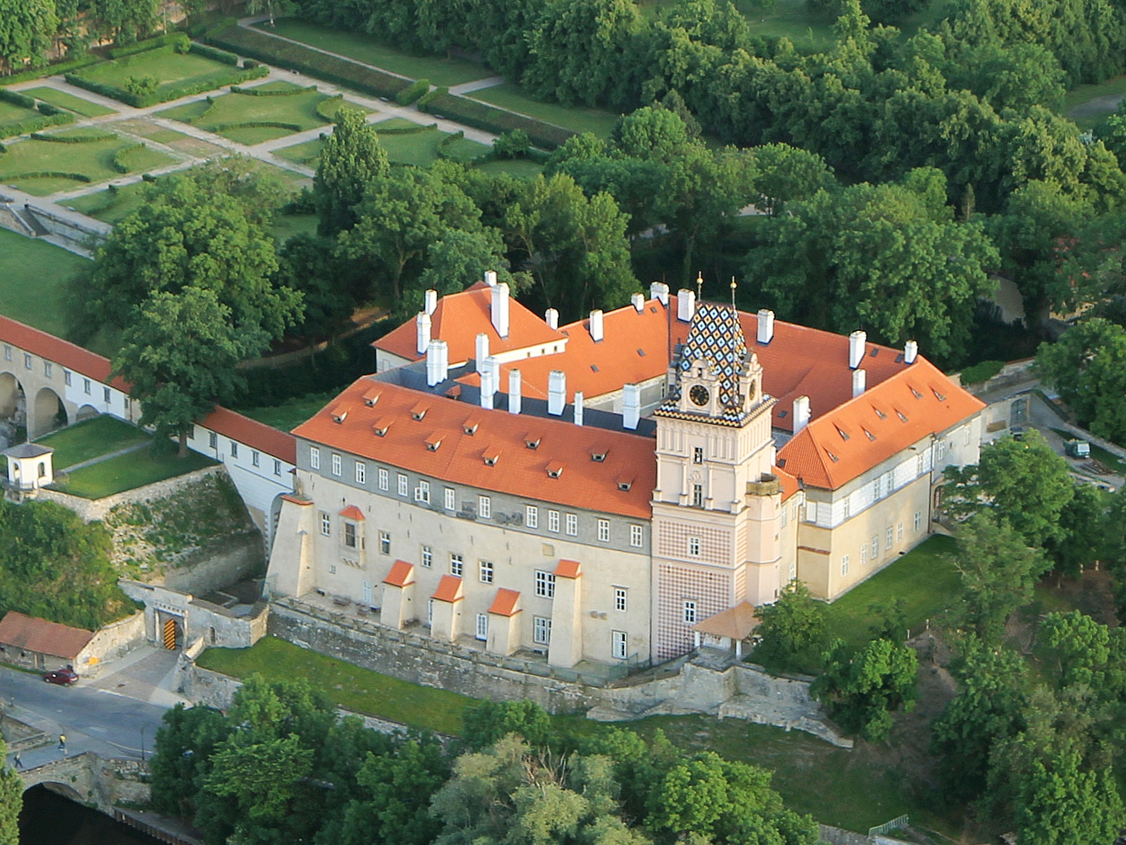 Zámek Brandýs nad Labem, nad řekou 402/8, Brandýs nad Labem